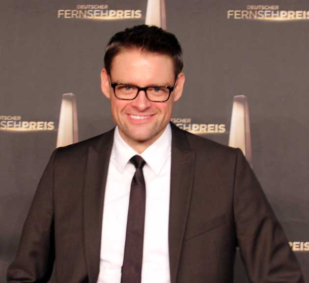 Max Giermann beim Deutschen Fernsehpreis 2012